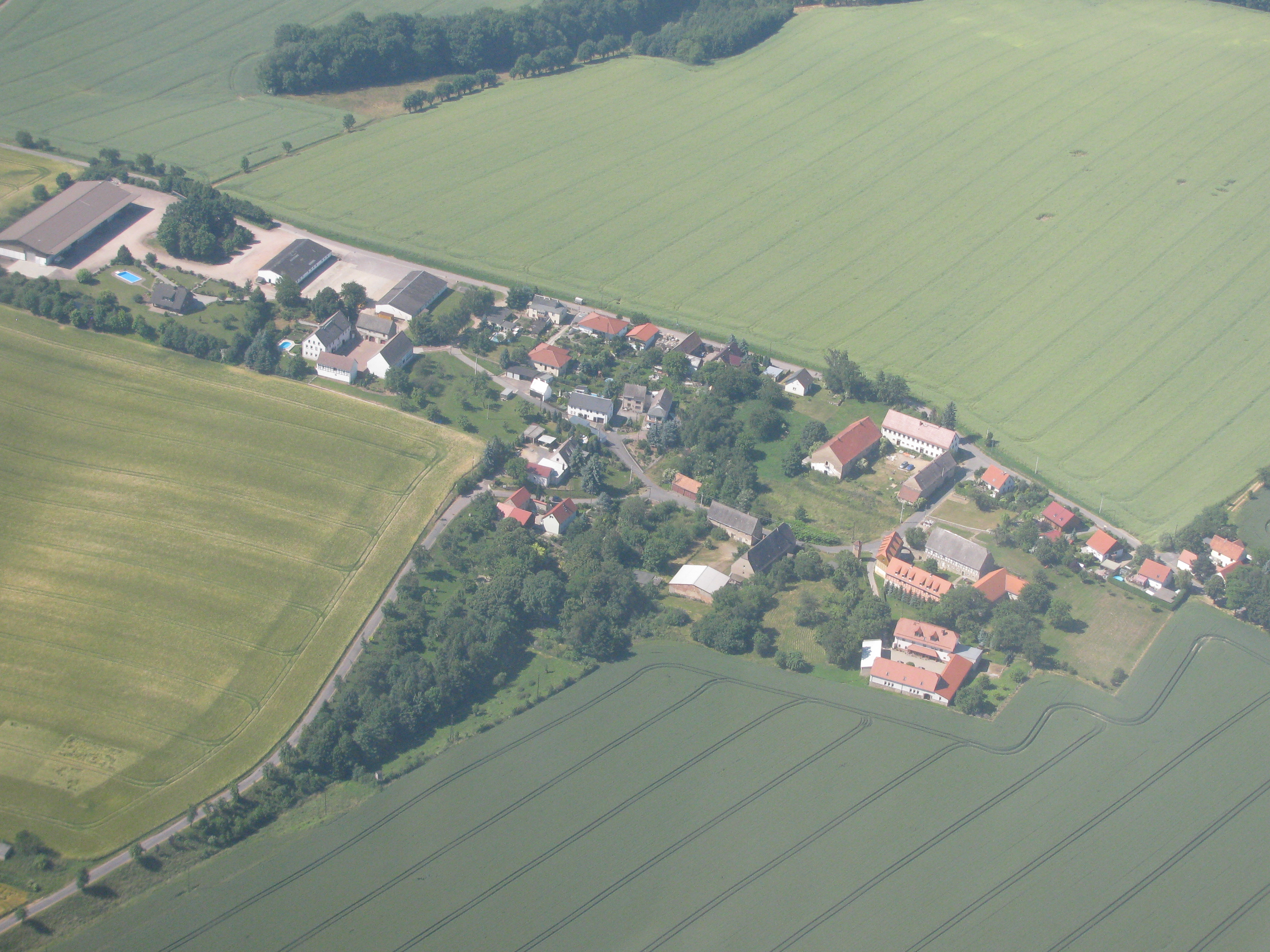 Luftbild Weitzschen